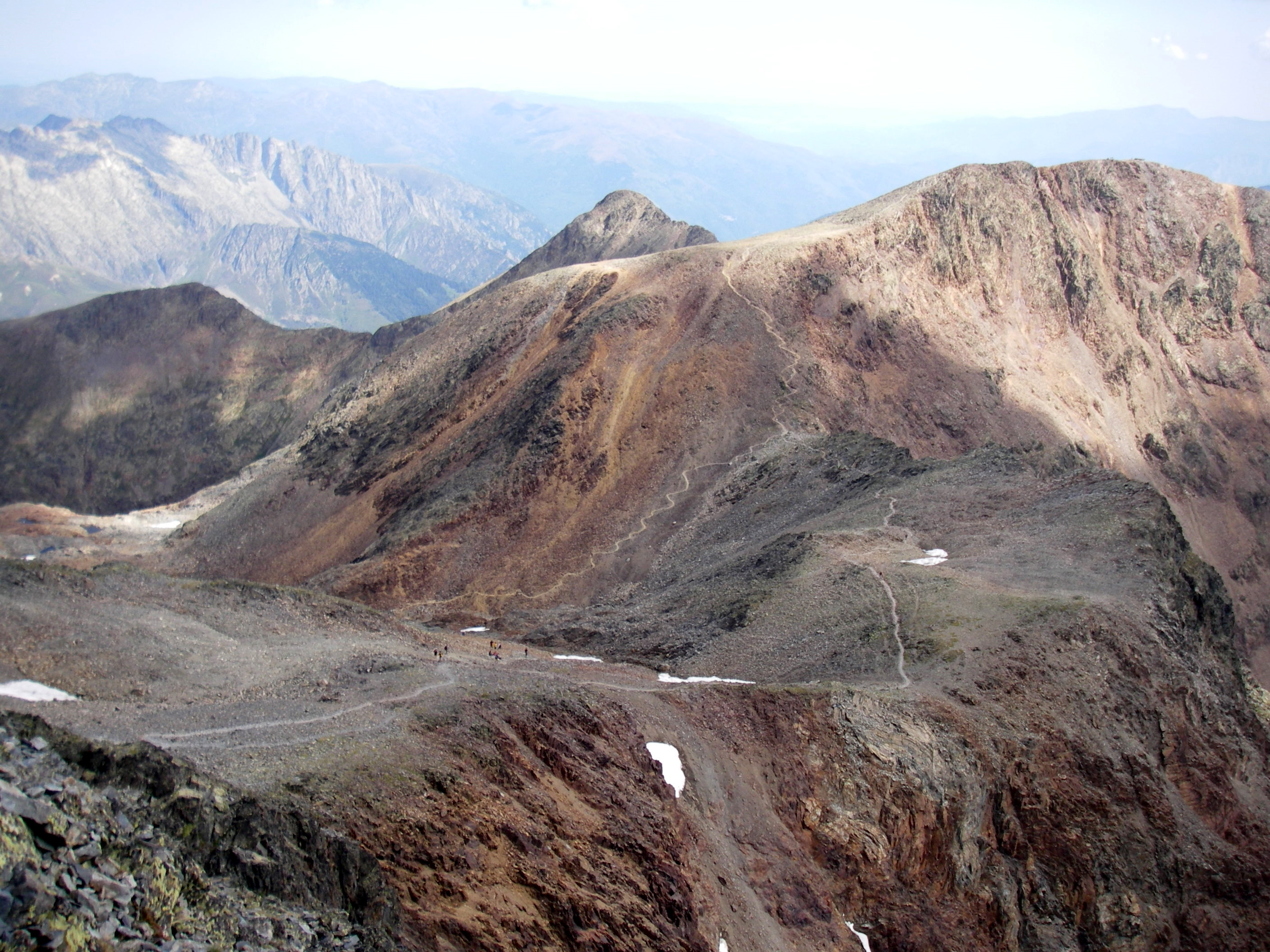 Vue du pic de Montcalm (3077m) depuis la pique d'Estats (3143m). Au premier plan le chemin pour la montée finale vers la pique d'Estats.